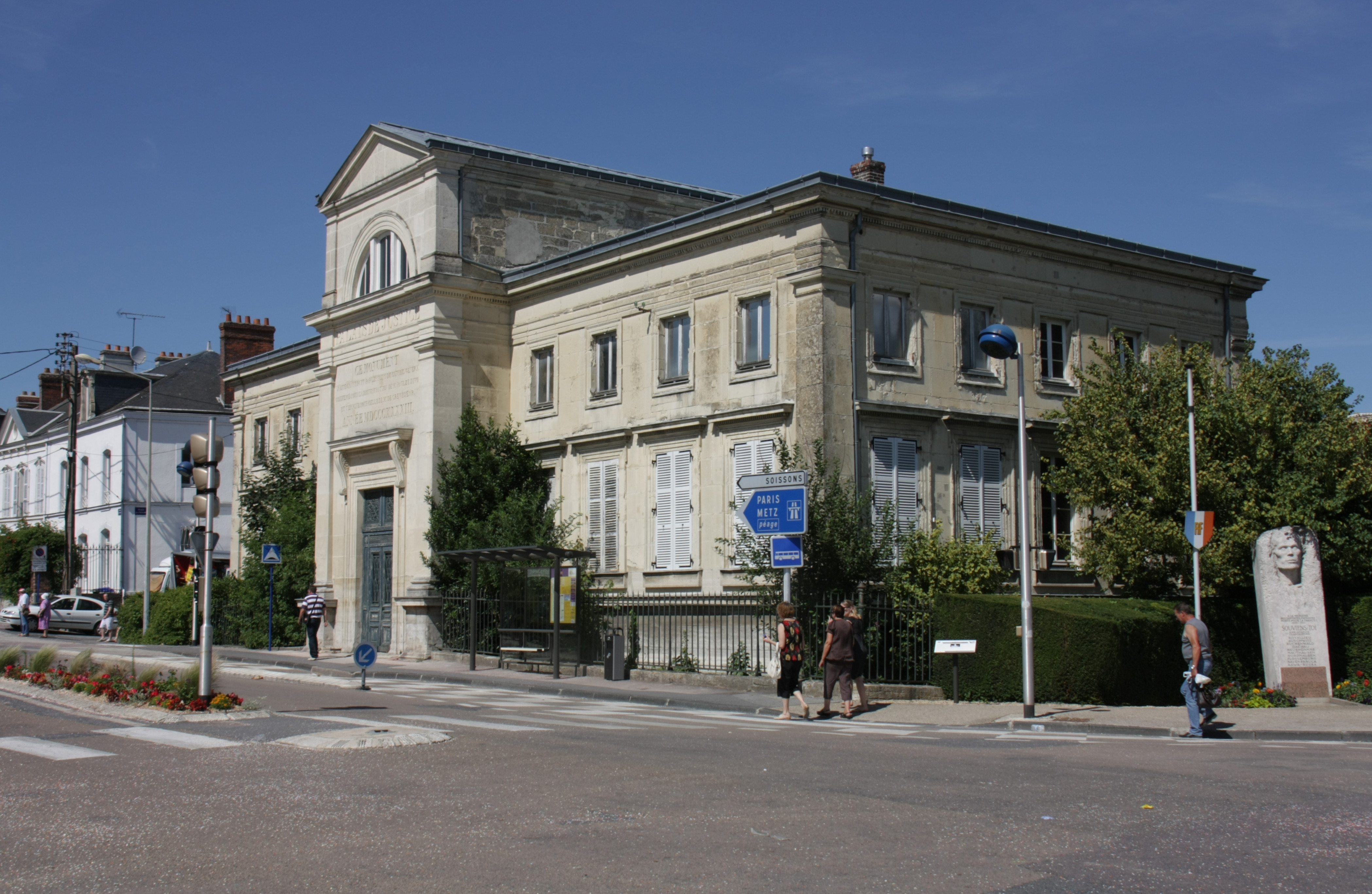 Palais de Justice de Château-Thierry - vu côté avenue de Soissons.